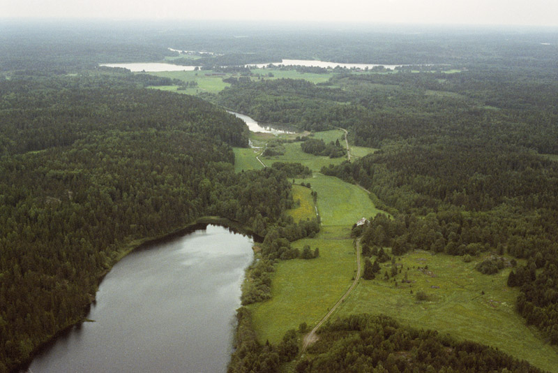 Fäglasjön i förgrunden, i mitten Hagsjön, upptill Länna kyrksjö, från norr. Motiv: Länna Nyckelord: Flygbilder, Riksintressen Kategori: Insjömiljöer Fäglasjön i förgrunden, i mitten Hagsjön, upptill Länna kyrksjö, från norr.